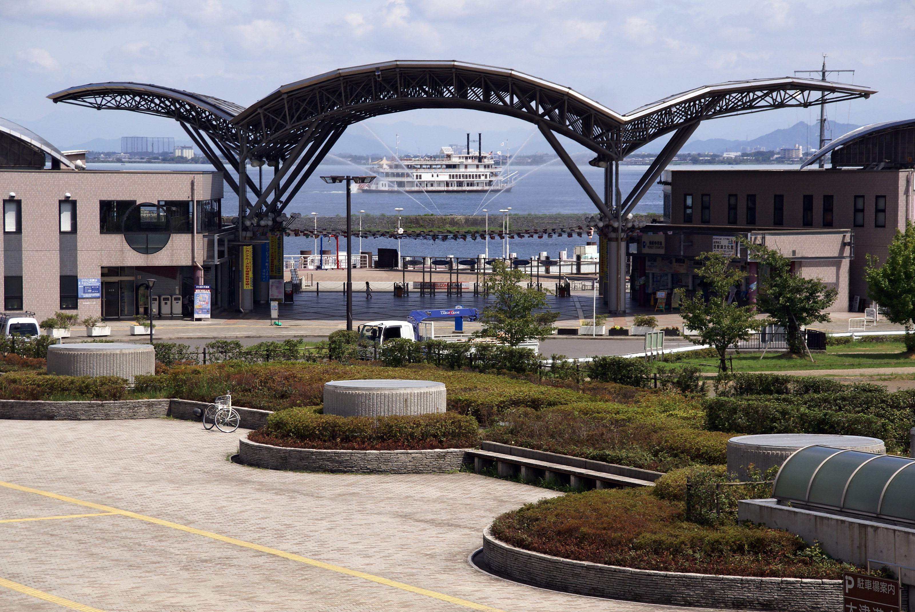 Otsu port in Otsu, Shiga prefecture, Japan